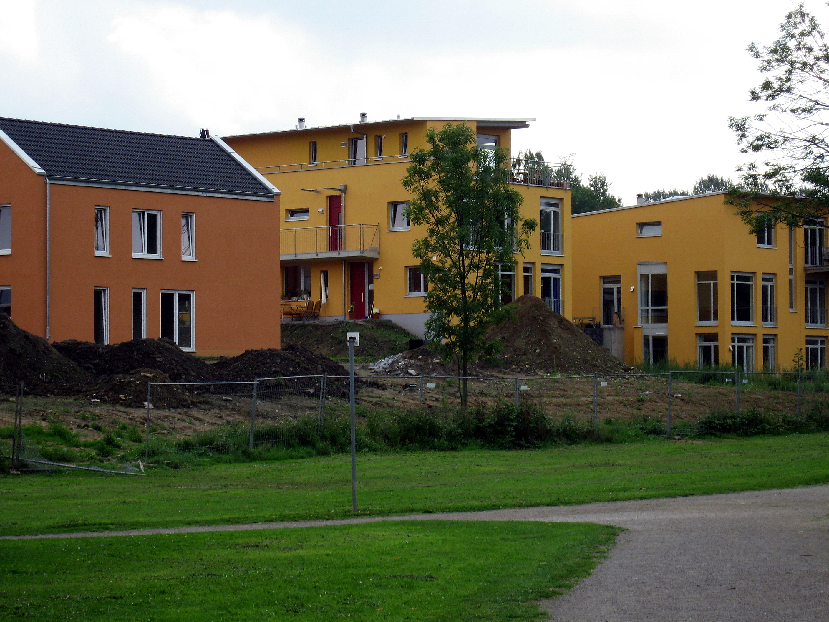 Dortmund-Tremonia-Park-Neubauten